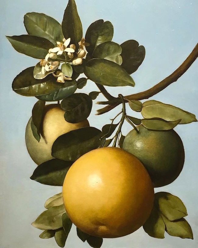 Michel Garnier (1753–1829): Pampelmuse (Citrus maxima bzw. Citrus decumana L.). Eines der 140 Bilder tropischer Nutzpflanzen, die der Künstler auf Mauritius malte, wo er sich 1801–1809 aufhielt. Öl auf Papier, auf Leinwand geklebt, 59 x 45 cm. Talabardon & Gautier, Paris.